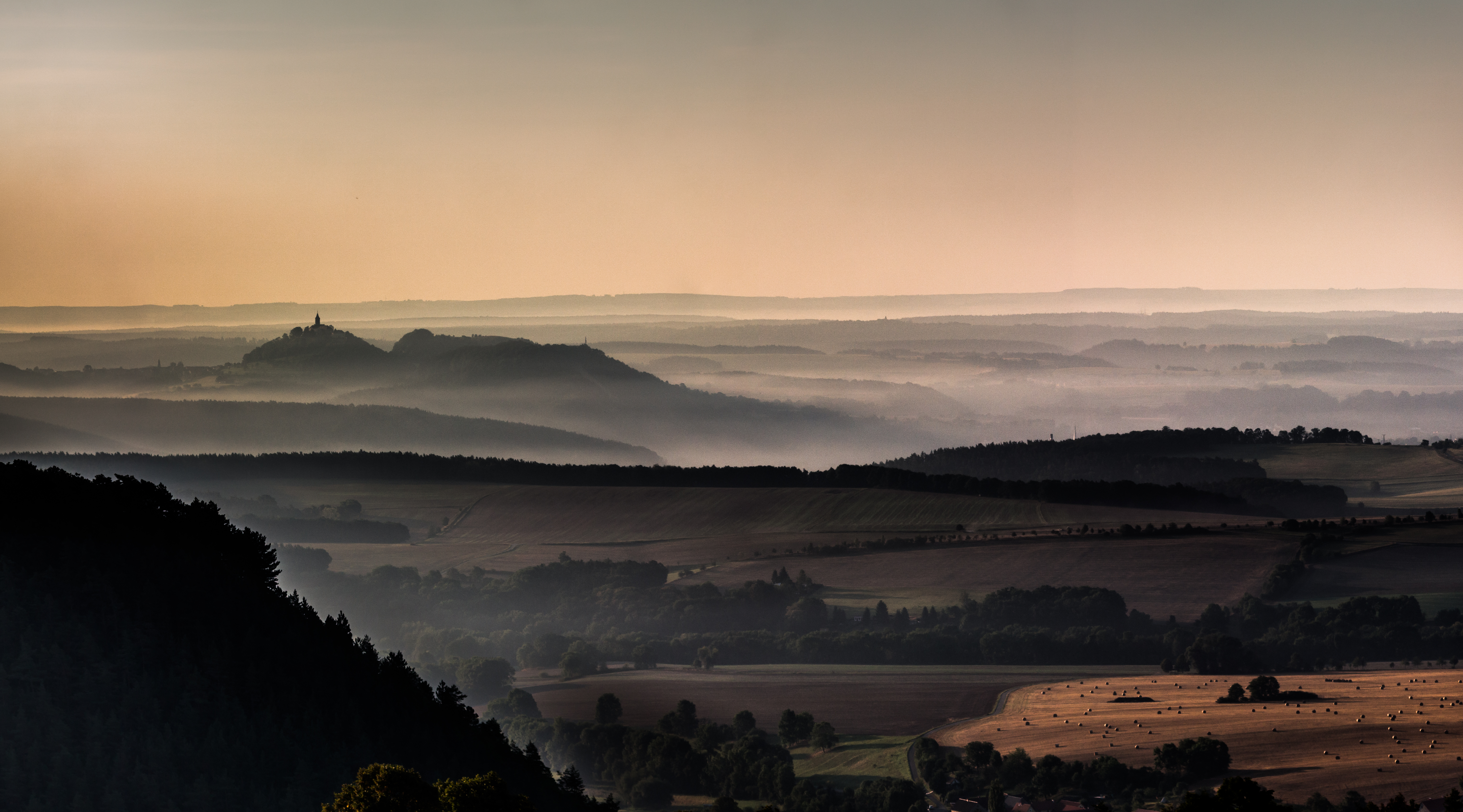 Die Leuchtenburg, auch "Königin des Saaletals" genannt, thront hoch über diesem im morgendlichen Nebel.